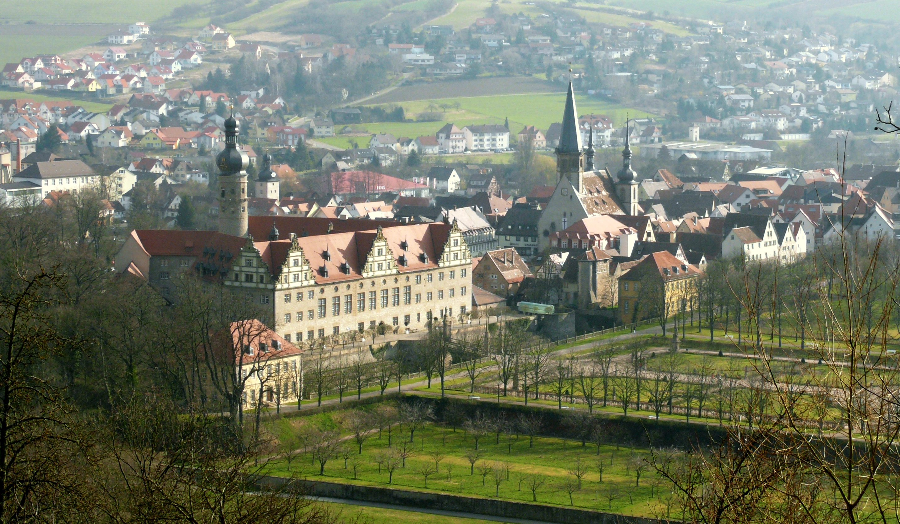 Blick zum Schloss Weikersheim vom Winterberg